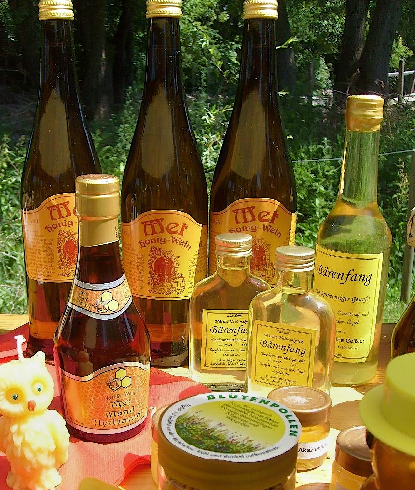 Angebot an verschiedenen Honiggetränken beim Direktverkauf von Honig und Honigprodukten (hier von einer Imkerin in Mecklenburg-Vorpommern, Deutschland). Gemäß Etiketten von links nach rechts: Honig-Wein, Met und Bärenfang; vorne befindet sich u. a. ein Glas mit Blütenpollen.